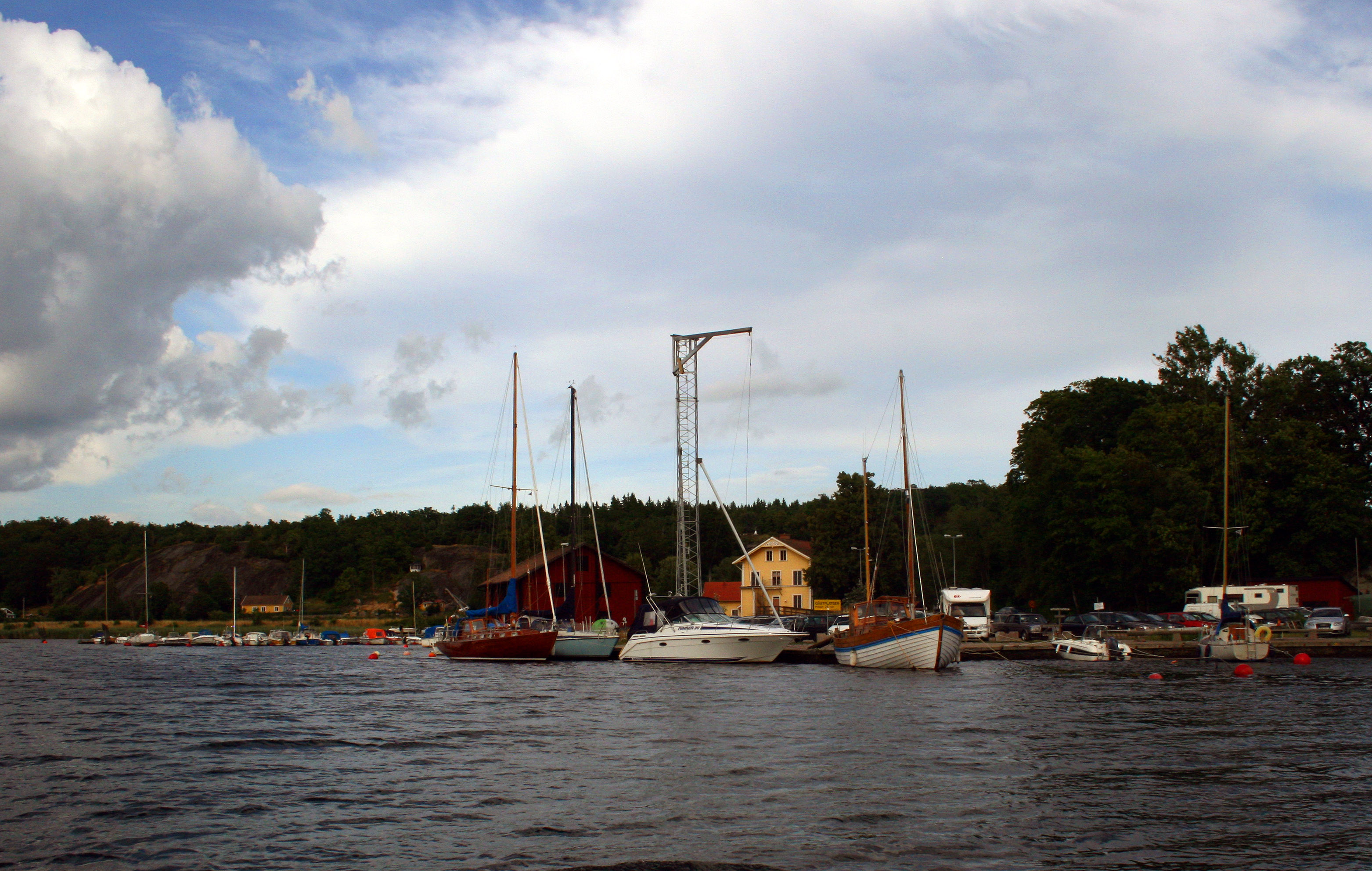 Järnavik